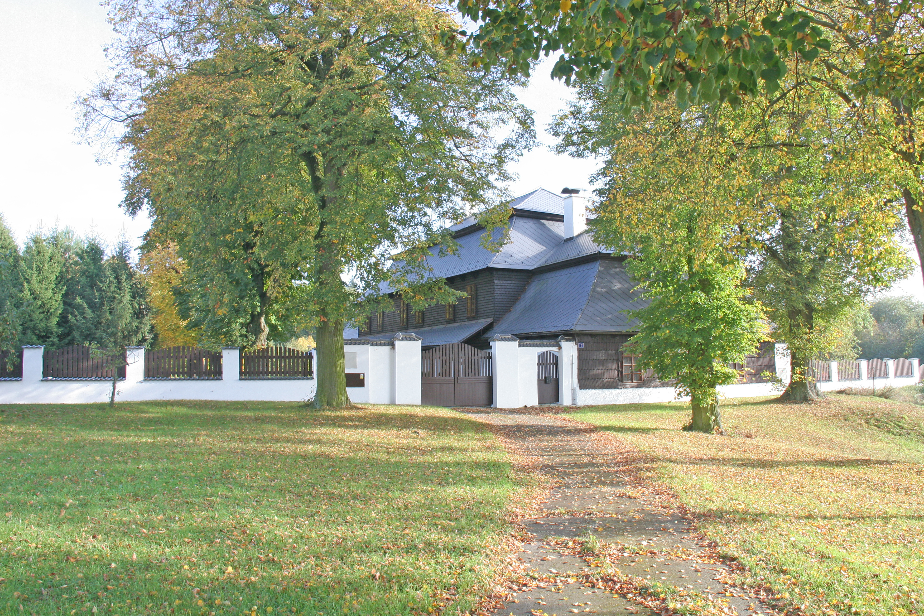 Lovecký zámeček Vlkov nad Lesy, Vlkov nad Lesy 1, jihovýchodně od kostela, Vlkov nad Lesy.